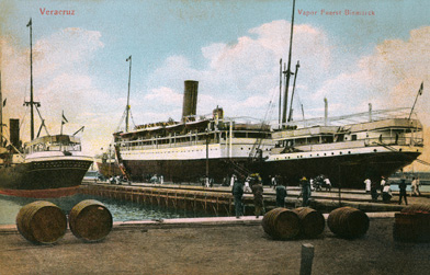 Der Dampfer FÜRST BISMARCK der HAPAG für den Mexiko-Dienst